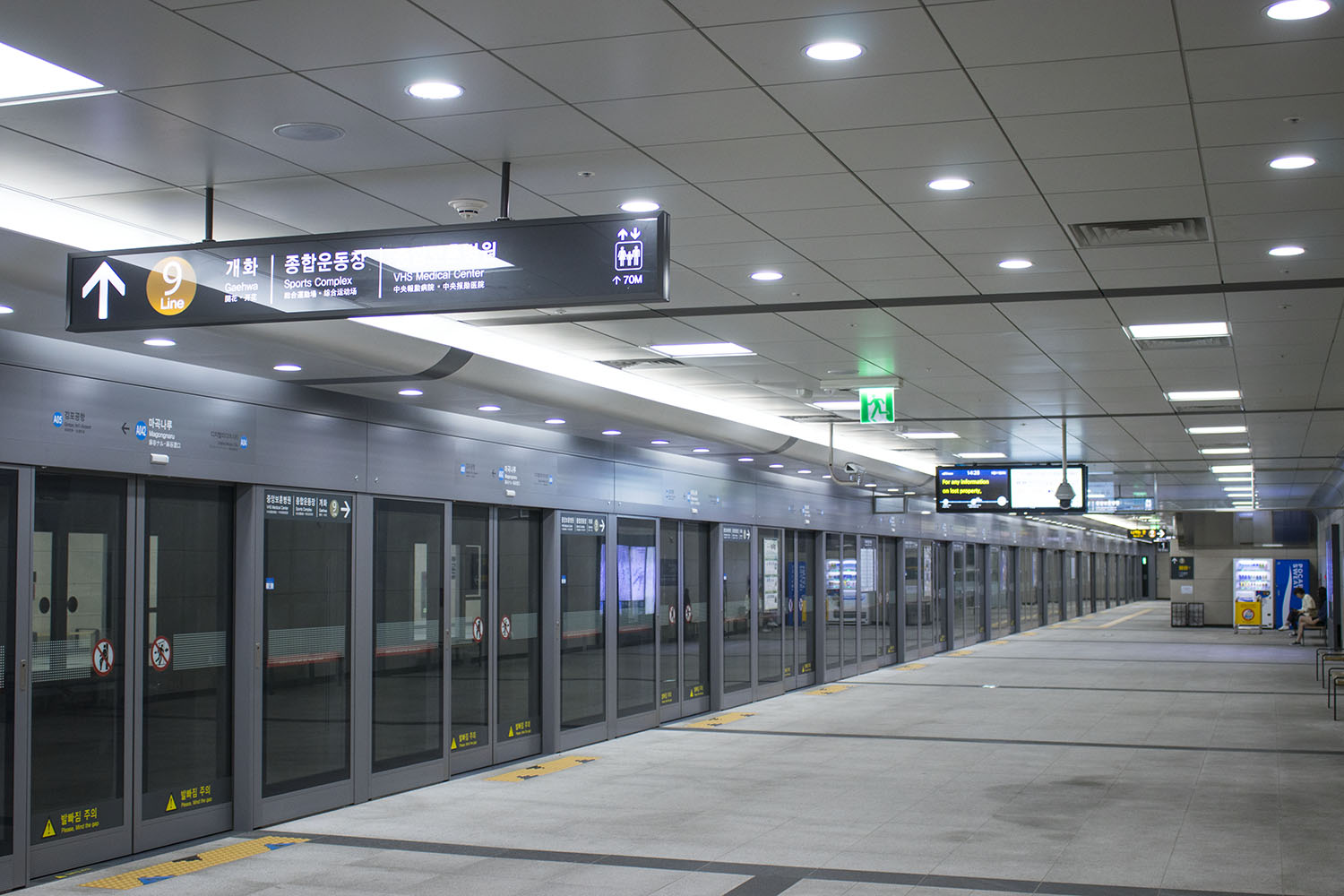 공항철도 마곡나루역 승강장